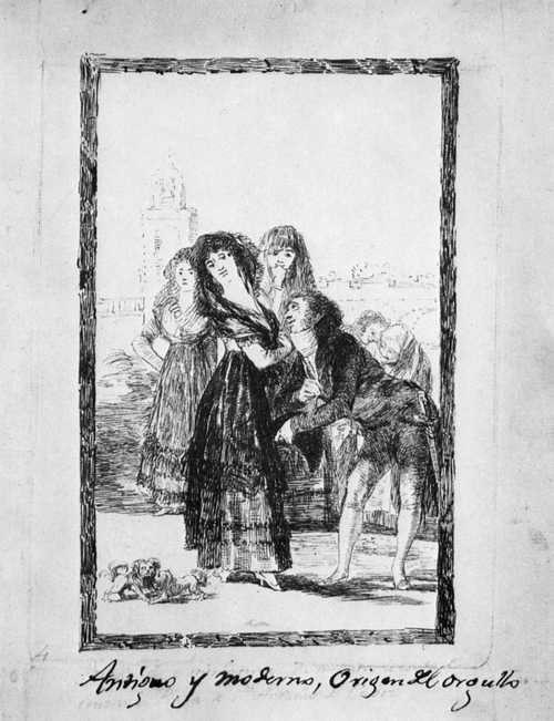 Dibujo preparatorio del capricho nª 27.